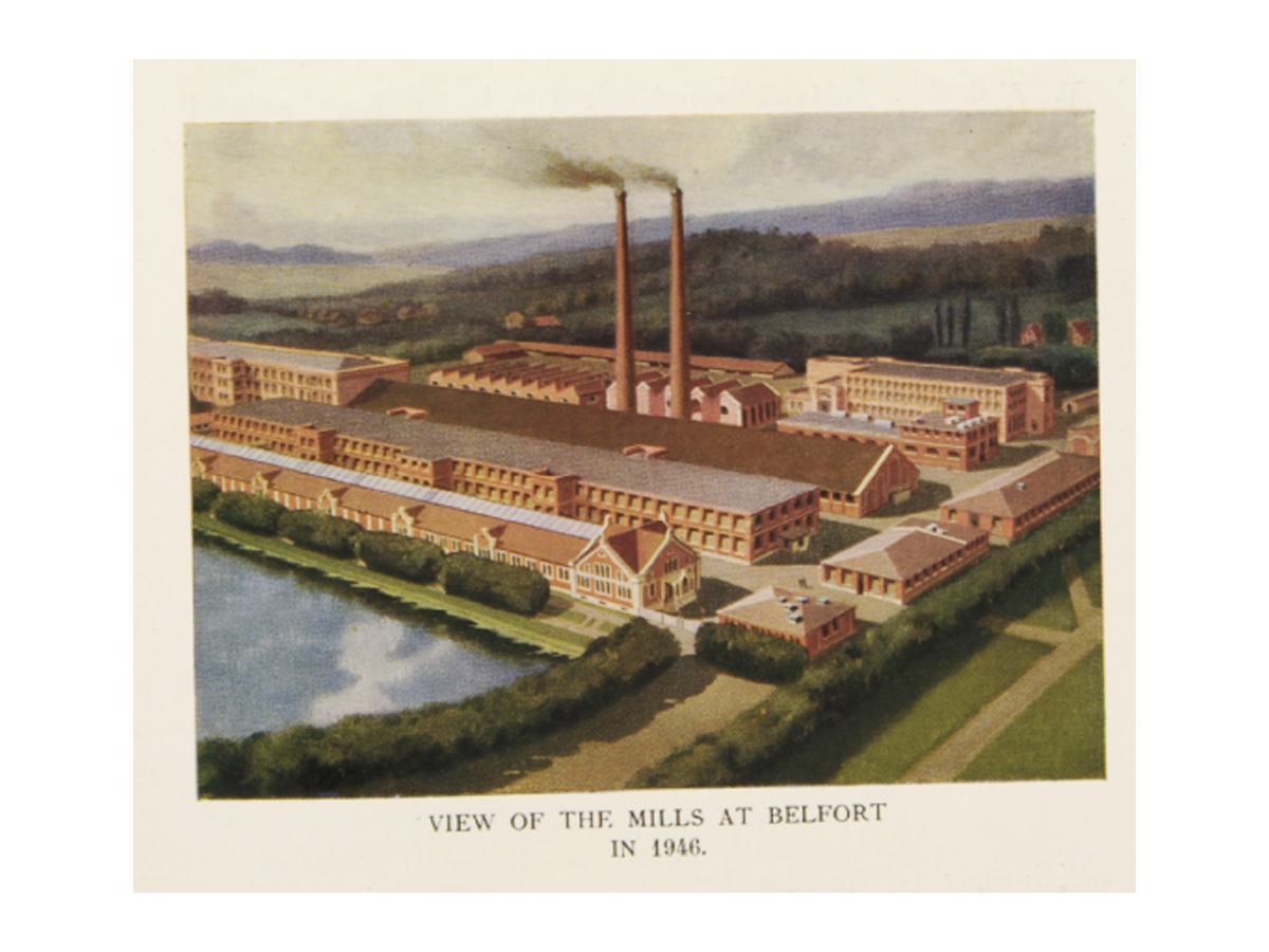 белфорт